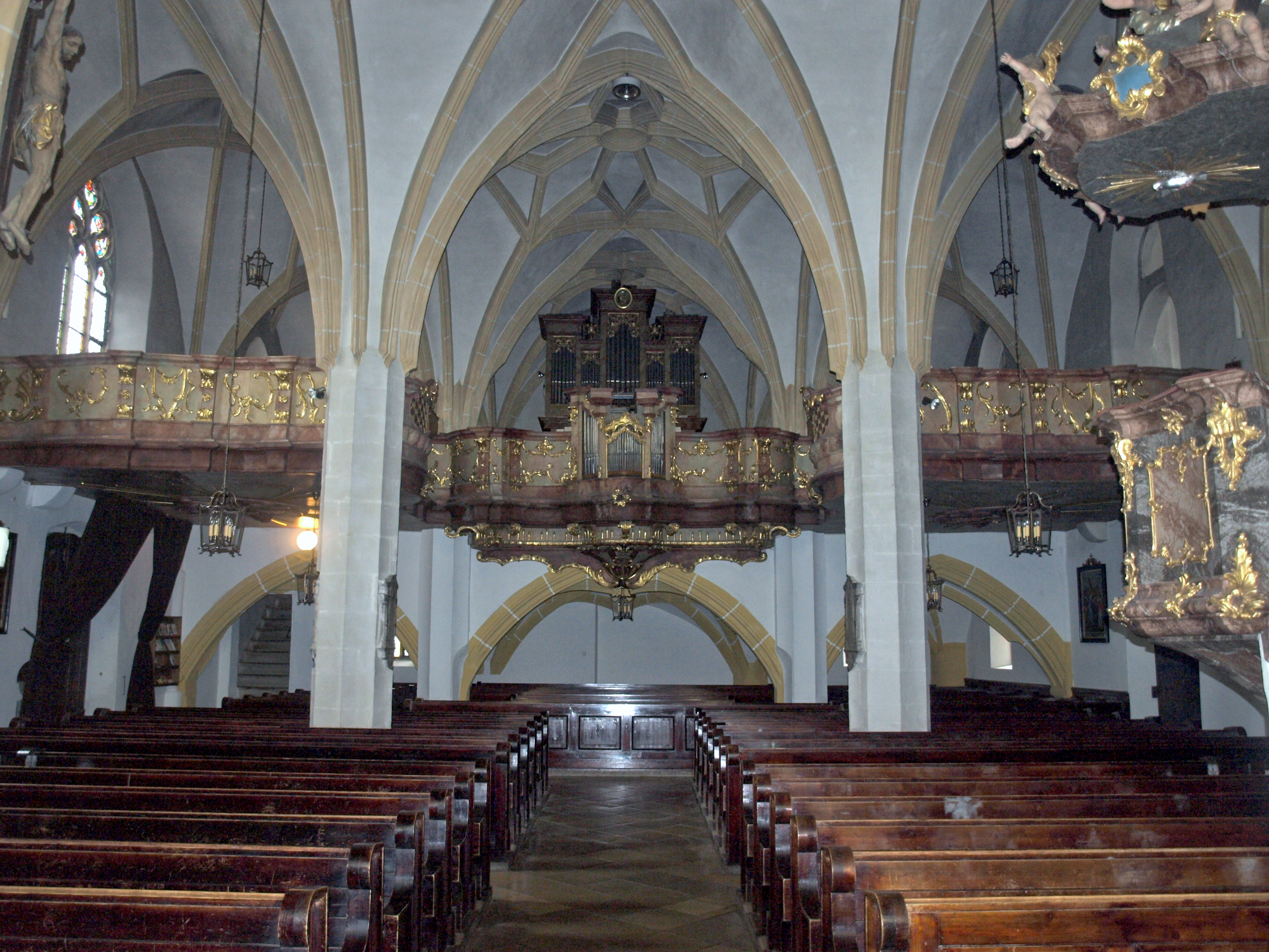 Kath. Pfarrkirche Mariae Himmelfahrt